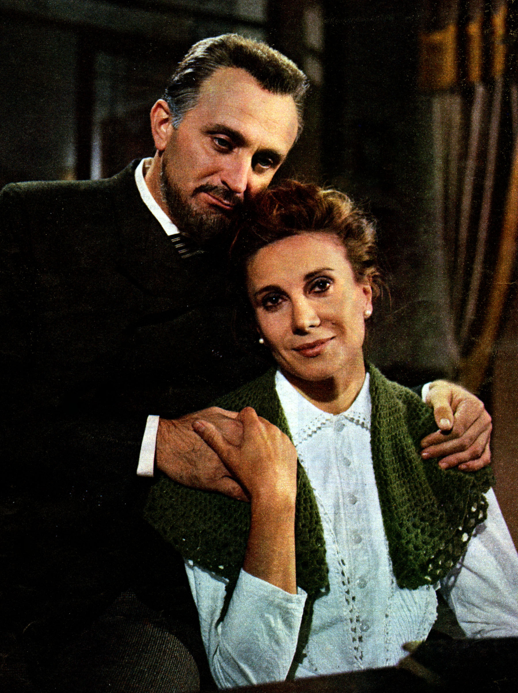 Raoul Grassilli e Ileana Ghione